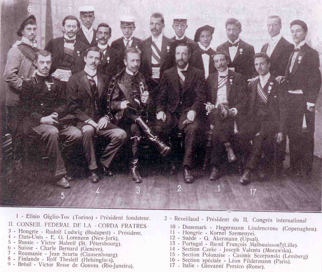 Photo du Conseil Fédéral de la Corda Fratres en 1900. Les n°6 et 13 portent des faluches. Efisio Giglio-Tos (Président fondateur) Reveillaud Hongrie Rudolph Ludwig ... ... ... ... ... ... Danemark (Copenhague) Cai Ditlev Hegermann-Lindencrone (1881-1947). ... ... ... ... ... Section speciale: Léon Fildermann (Paris) Giovanni Persico (Rome)